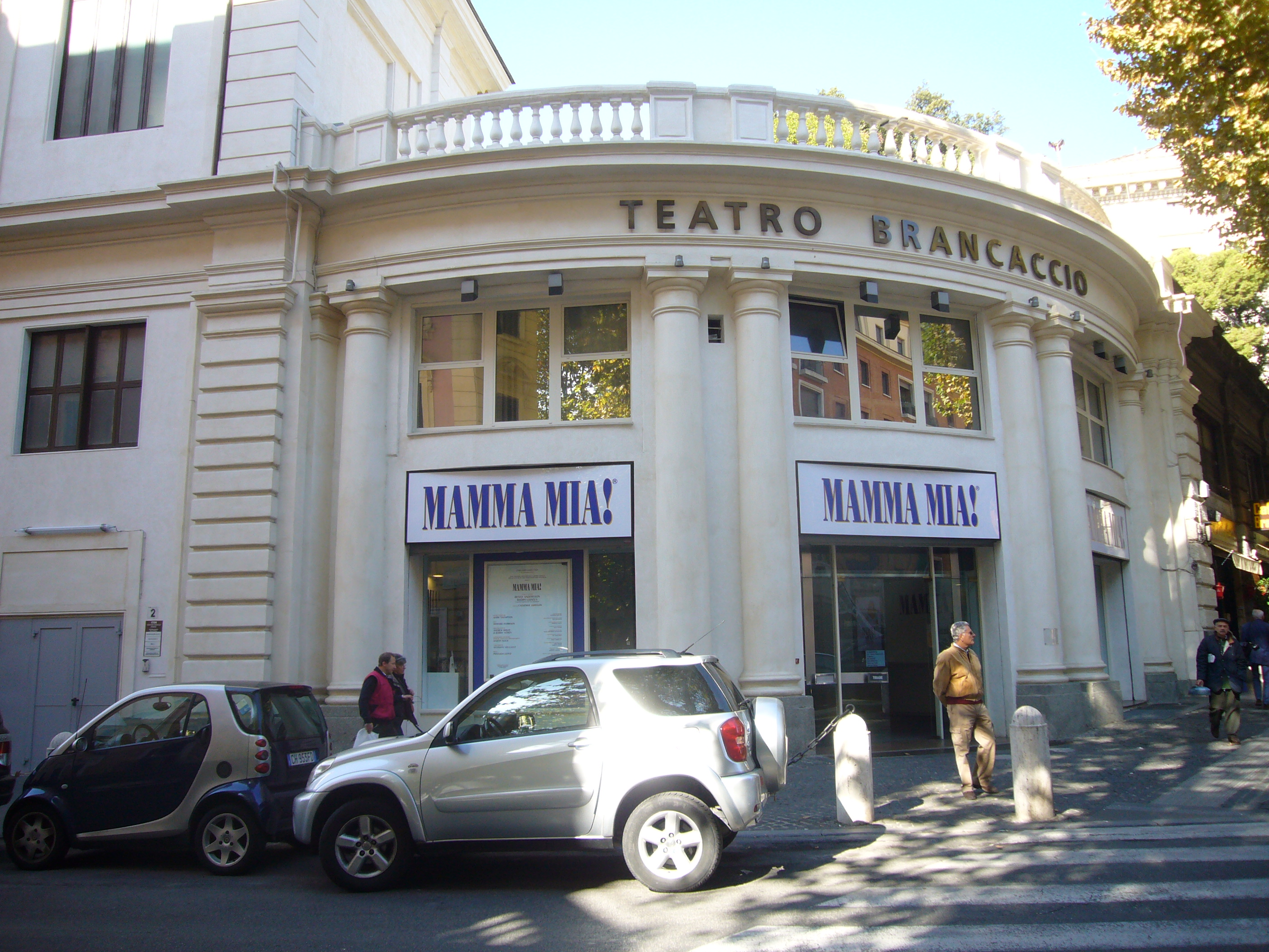 Roma, teatro Brancaccio a via Merulana